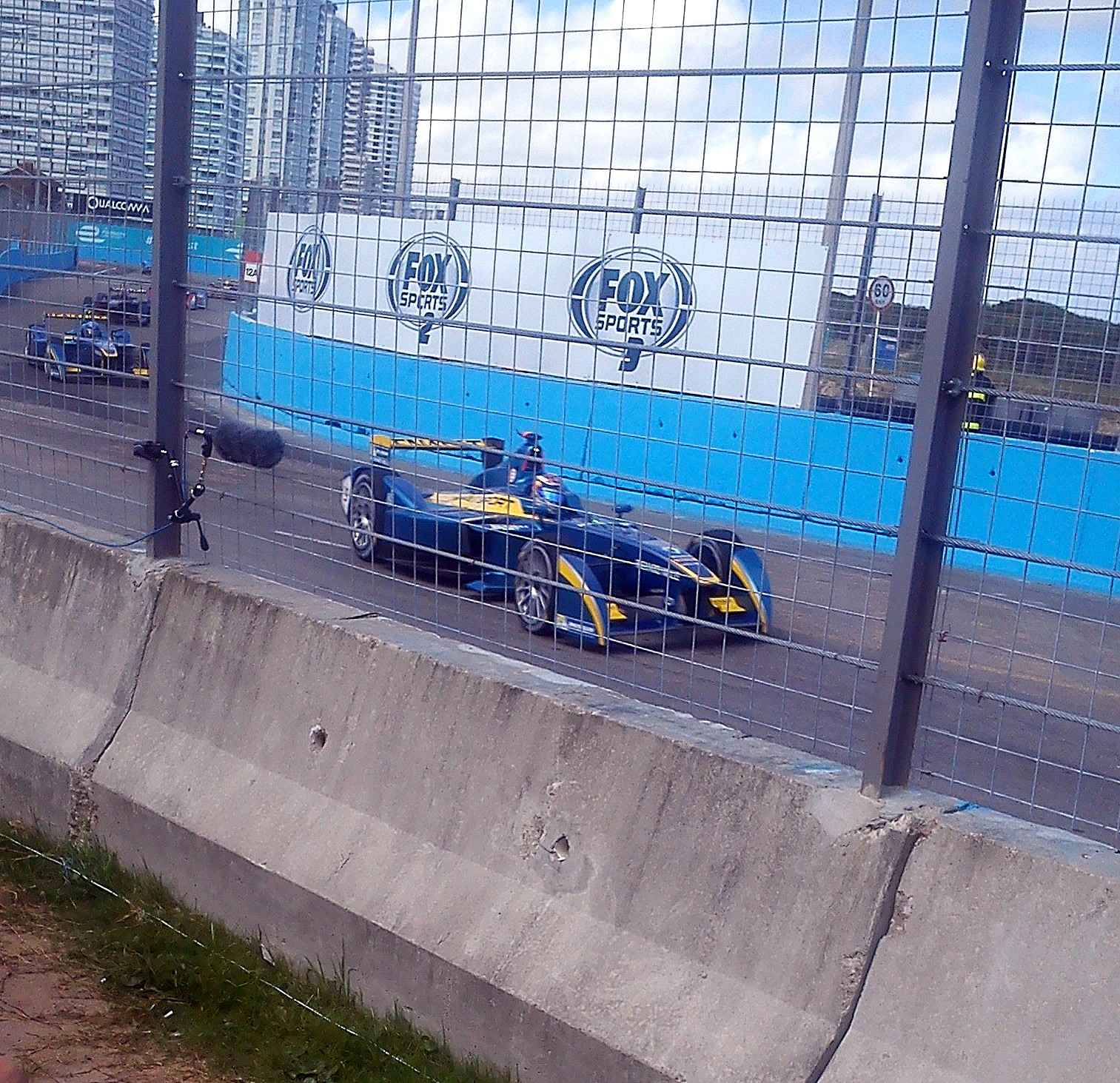 Sebastien Buemi en el en el ePrix de Punta del Este del 2014, fecha valida por la Formula E.